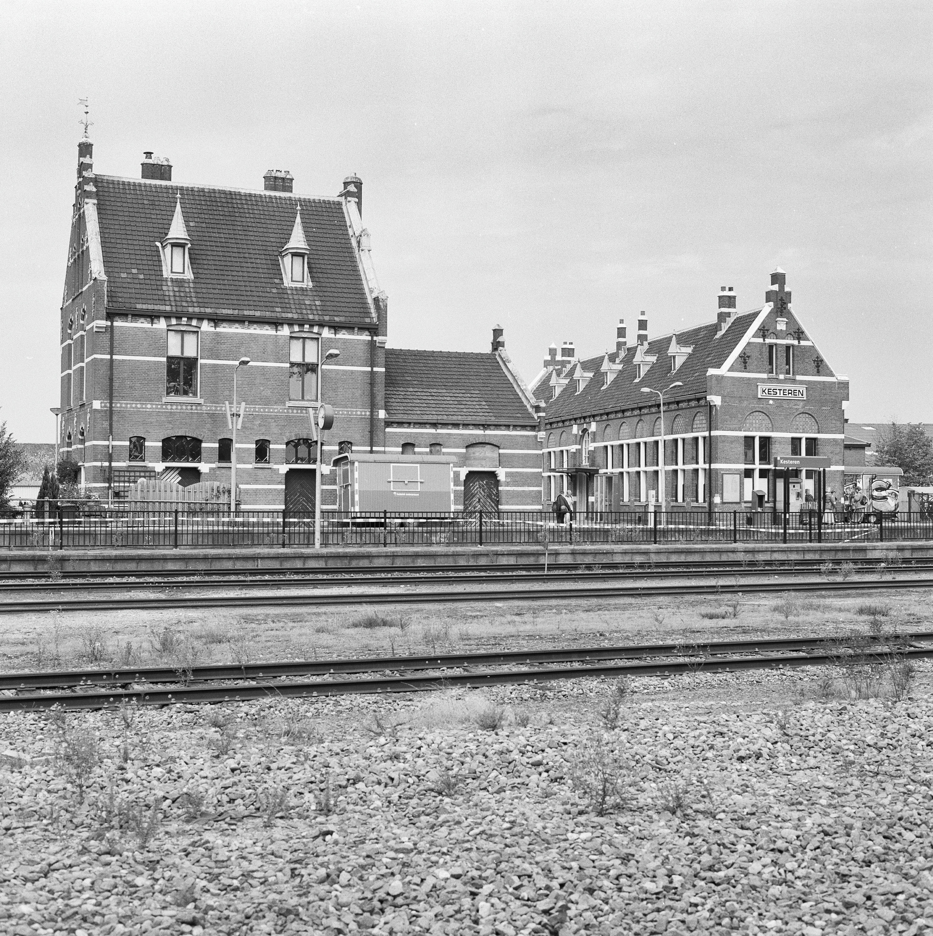 Station Kesteren: Overzicht achtergevel aan de spoorzijde en rechter zijgevel, met spoor op de voorgrond (opmerking: Gefotografeerd voor Monumenten In Nederland Gelderland)